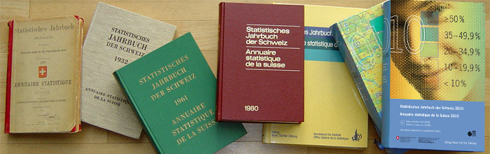 Statistische Jahrbücher der Schweiz